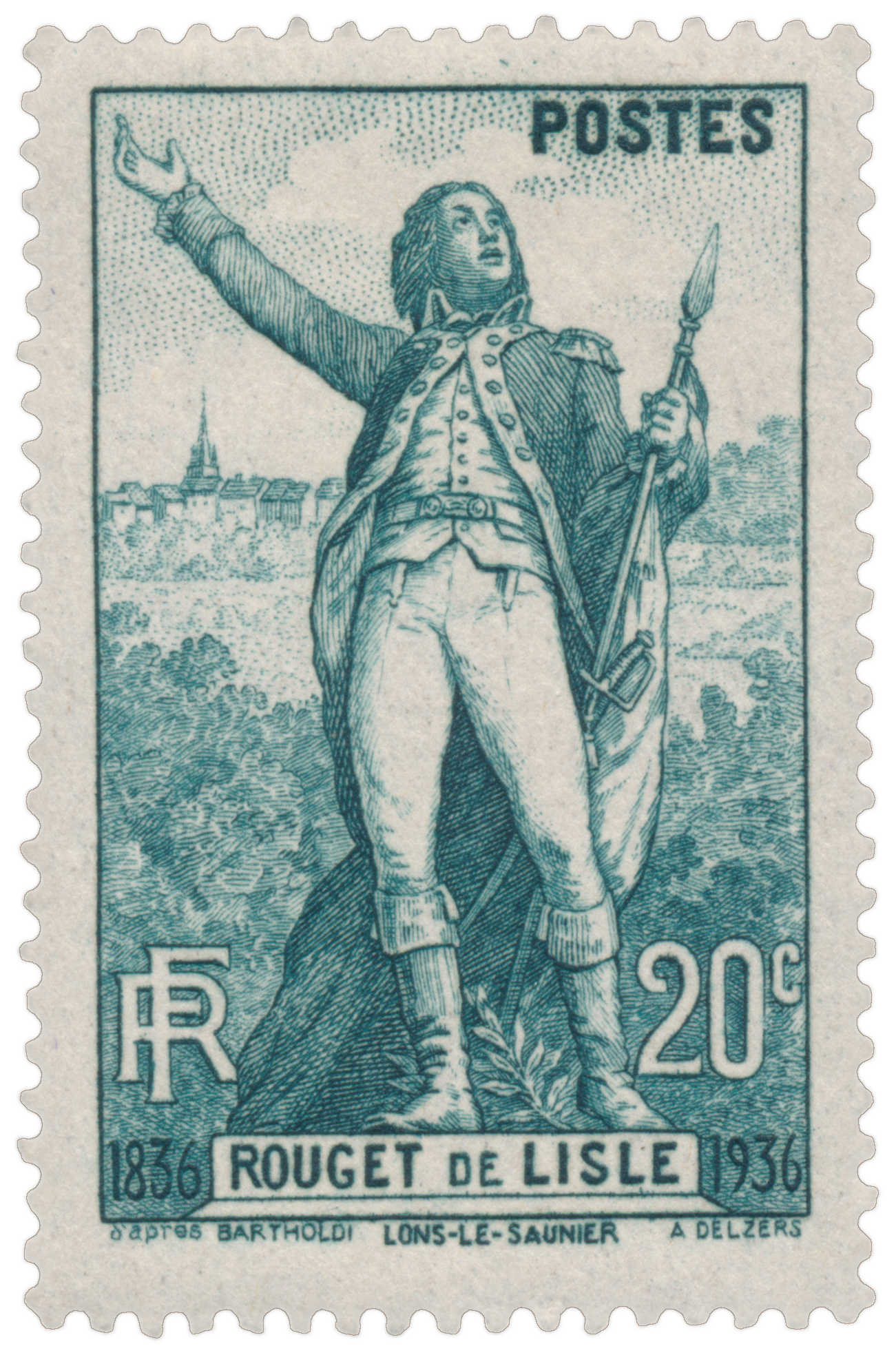 Claude Rouget de Lisle (1760-1836)